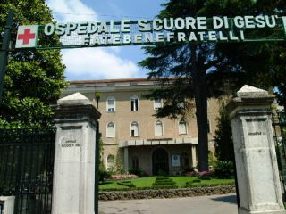 L'ospedale Sacro Cuore di Gesù gestito dall'ordine religioso dei Fatebenefratelli a Benevento